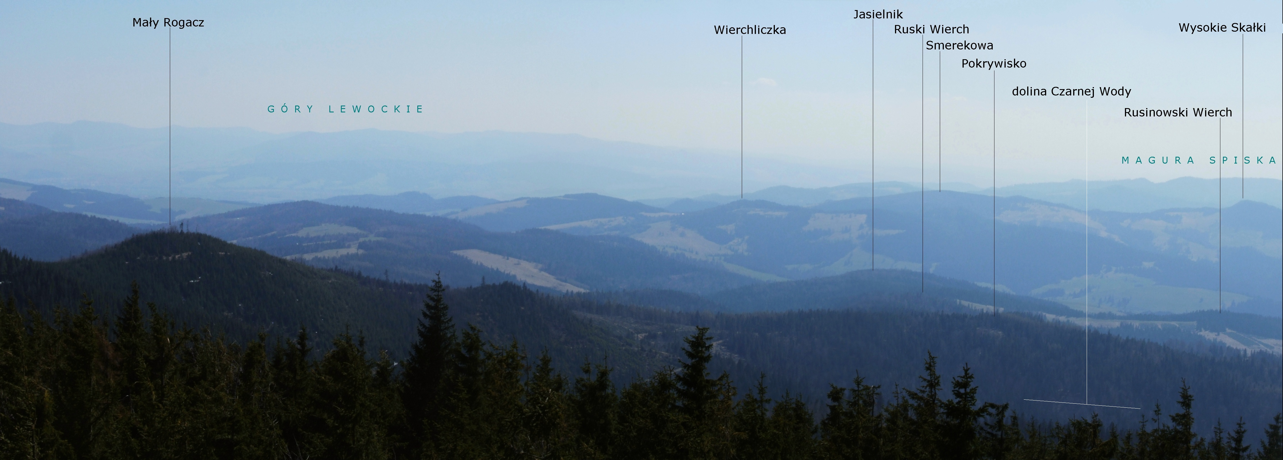 Widok z Radziejowej w Beskidzie Sądeckim